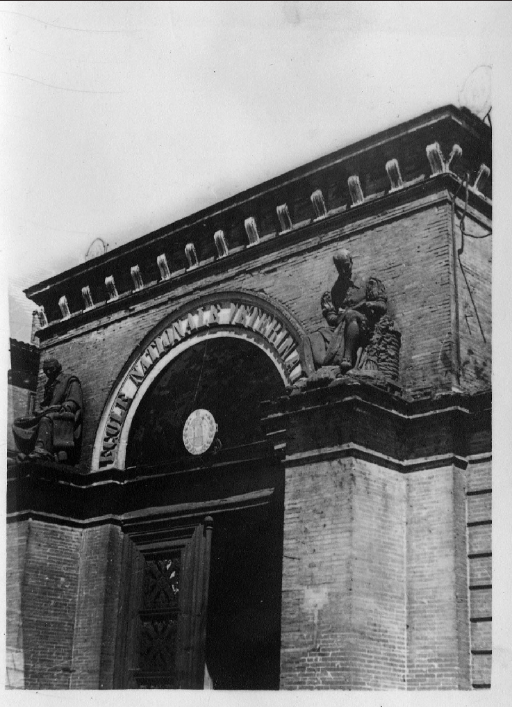 Portail de l'ancienne école vétérinaire de Toulouse encadrée par les sculptures de Bernard Griffoul-Dorval représentant Claude Bourgelat à gauche et Olivier de Serres à droite